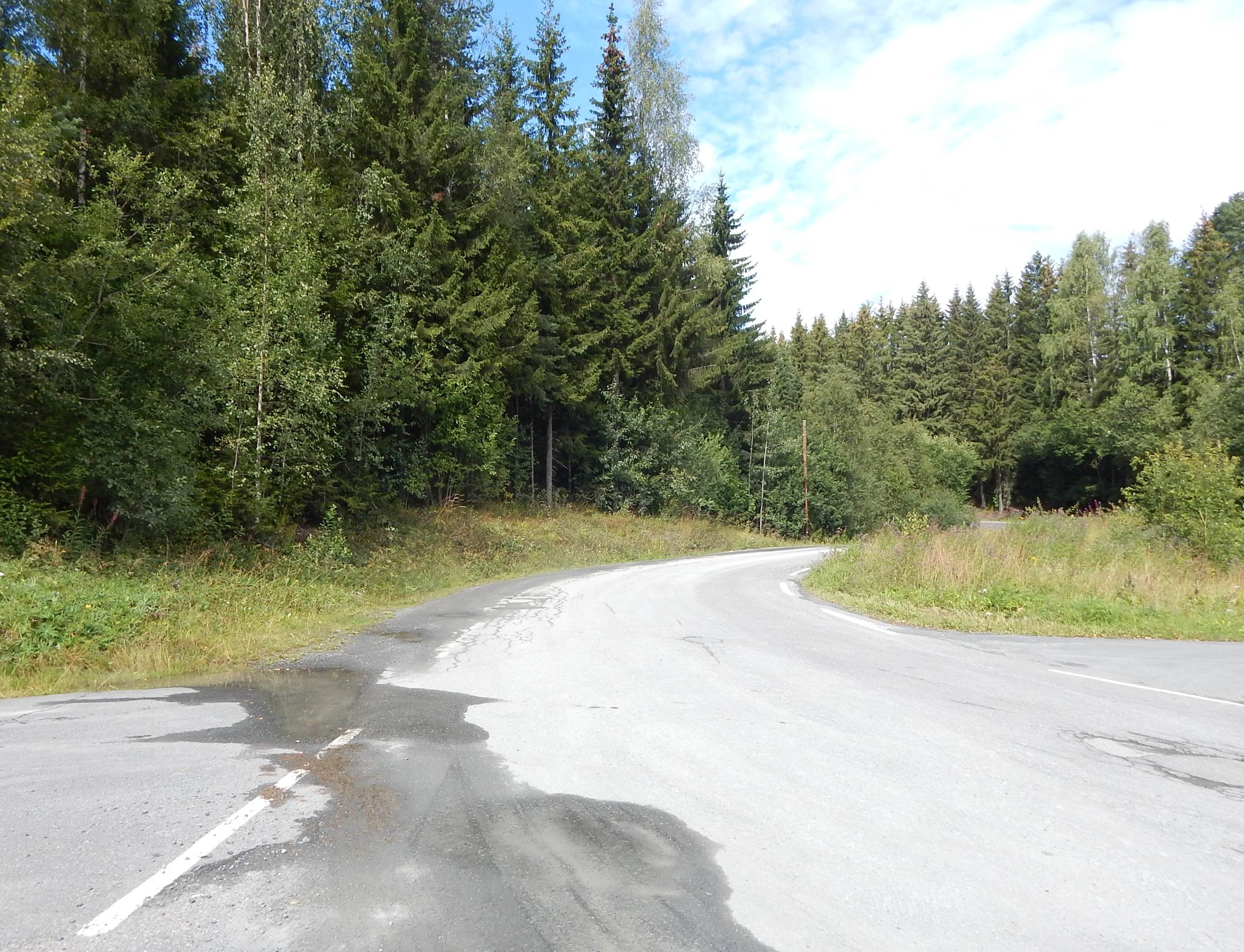 Klinkelinna (fylkesvei 2402, tidl. 150) sett fra Raufossvegen